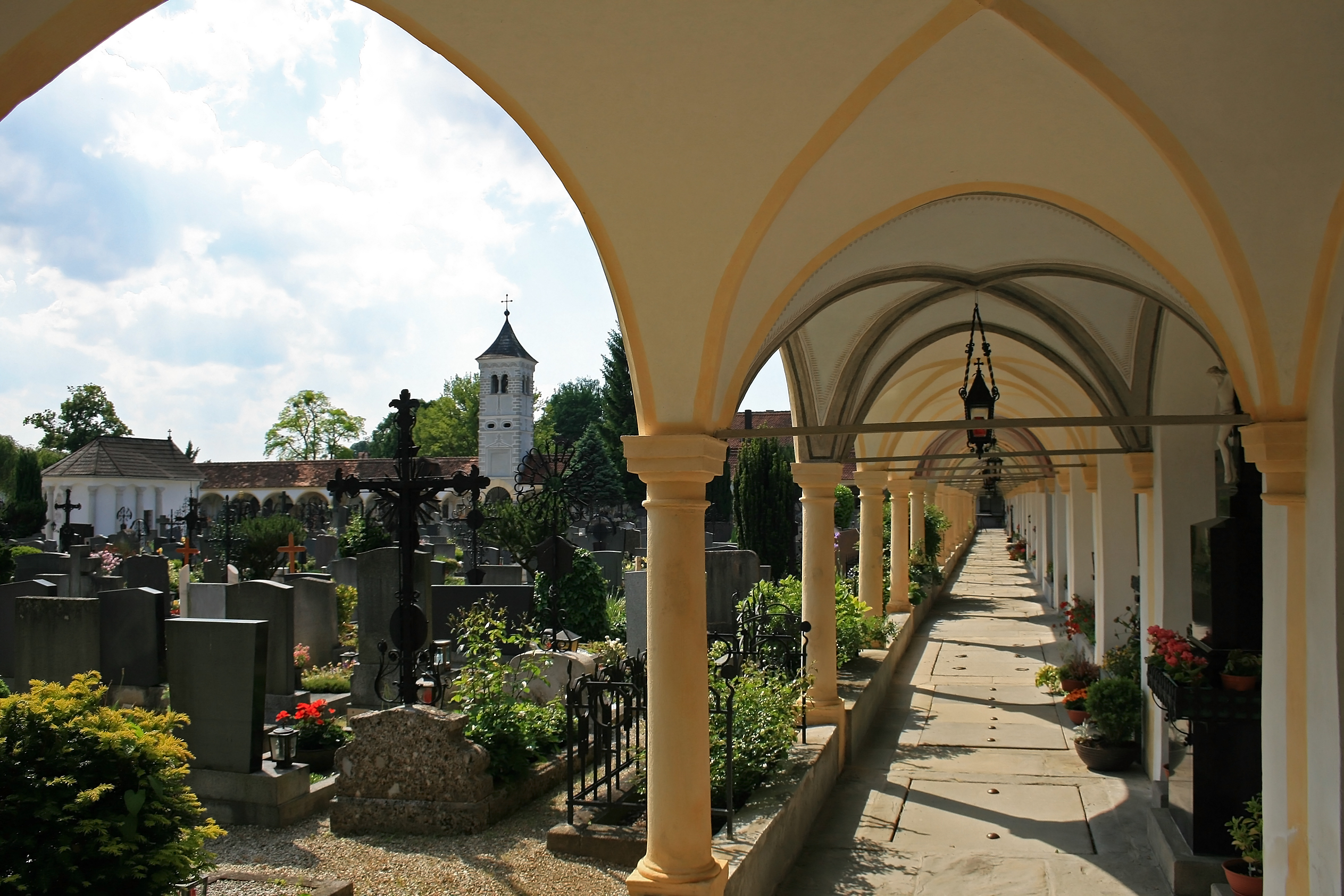 Der Taborfriedhof in Steyr. Blick aus einem der Arkadengänge zum Torturm am Haupteingang